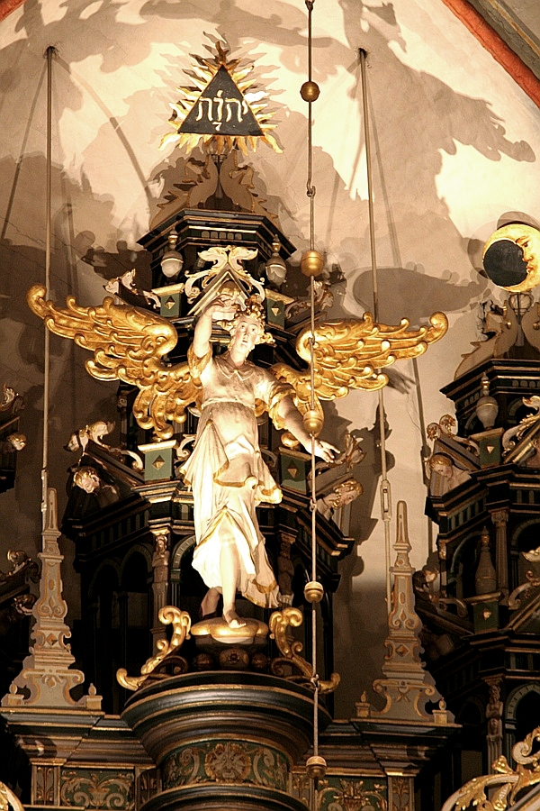 Engel auf der Hauptorgel in Lüneburg, St. Johannis